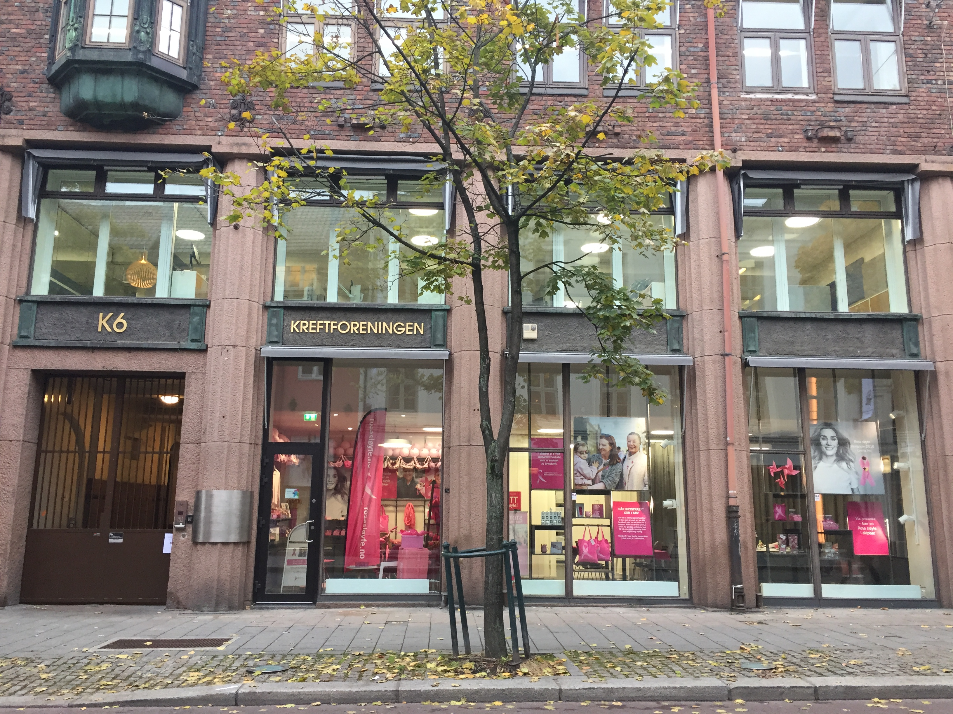 Kreftforeningens kontorer i Oslo.